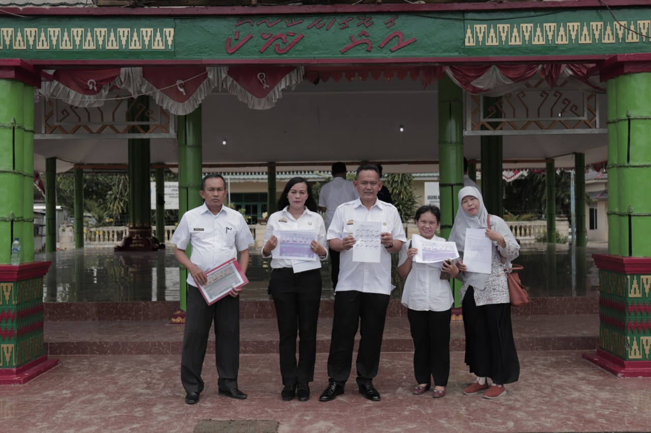 Wakil Bupati Pringsewu tinjau tanda bunyi aksara Lampung di Pendopo Kabupaten Pringsewu